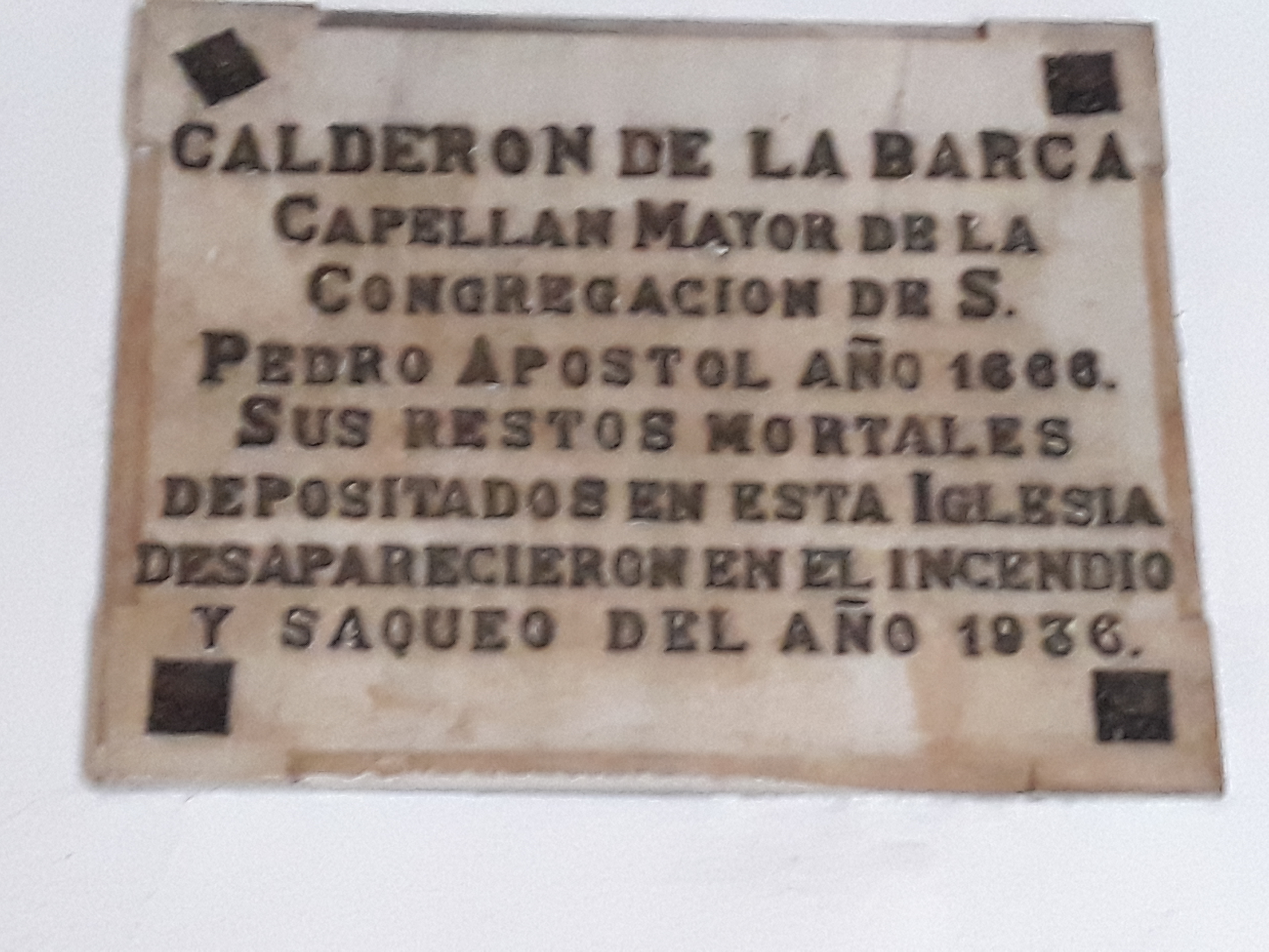 Gedenktafel für das Grab des spanischen Dramatikers Pedro Calderon de la Barca in der Kirche Nuestra Senora de los Dolores (Calle San Bernardo) in Madrid.